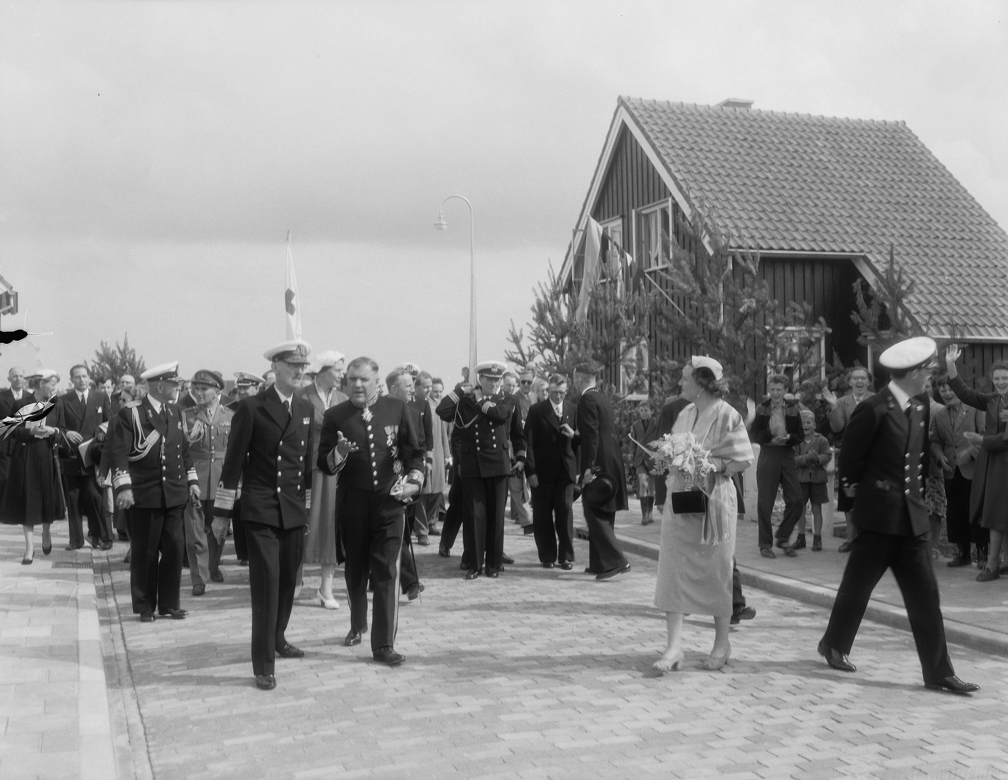 Collectie / Archief : Fotocollectie Anefo Reportage / Serie : [ onbekend ] Beschrijving : Tweede dag bezoek Koning Hakon aan Stavenisse, o.a. bezoek Hakonstraat Datum : 13 augustus 1954 Locatie : Stavenisse, Zeeland Trefwoorden : bezoeken Persoonsnaam : Koning Hakon Fotograaf : Duinen, […] van / Anefo Auteursrechthebbende : Nationaal Archief Materiaalsoort : Negatief (zwart/wit) Nummer archiefinventaris : bekijk toegang 2.24.01.04 Bestanddeelnummer : 906-6624